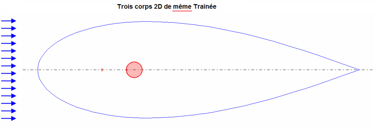 Les trois corps 2D représentés ici suscitent la même traînée (à un Reynolds longitudinal ou diamétral compris entre 10^6 et 10^7).